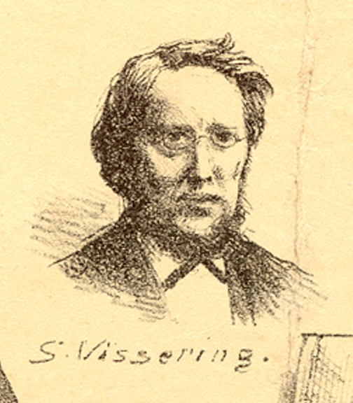 S. Vissering